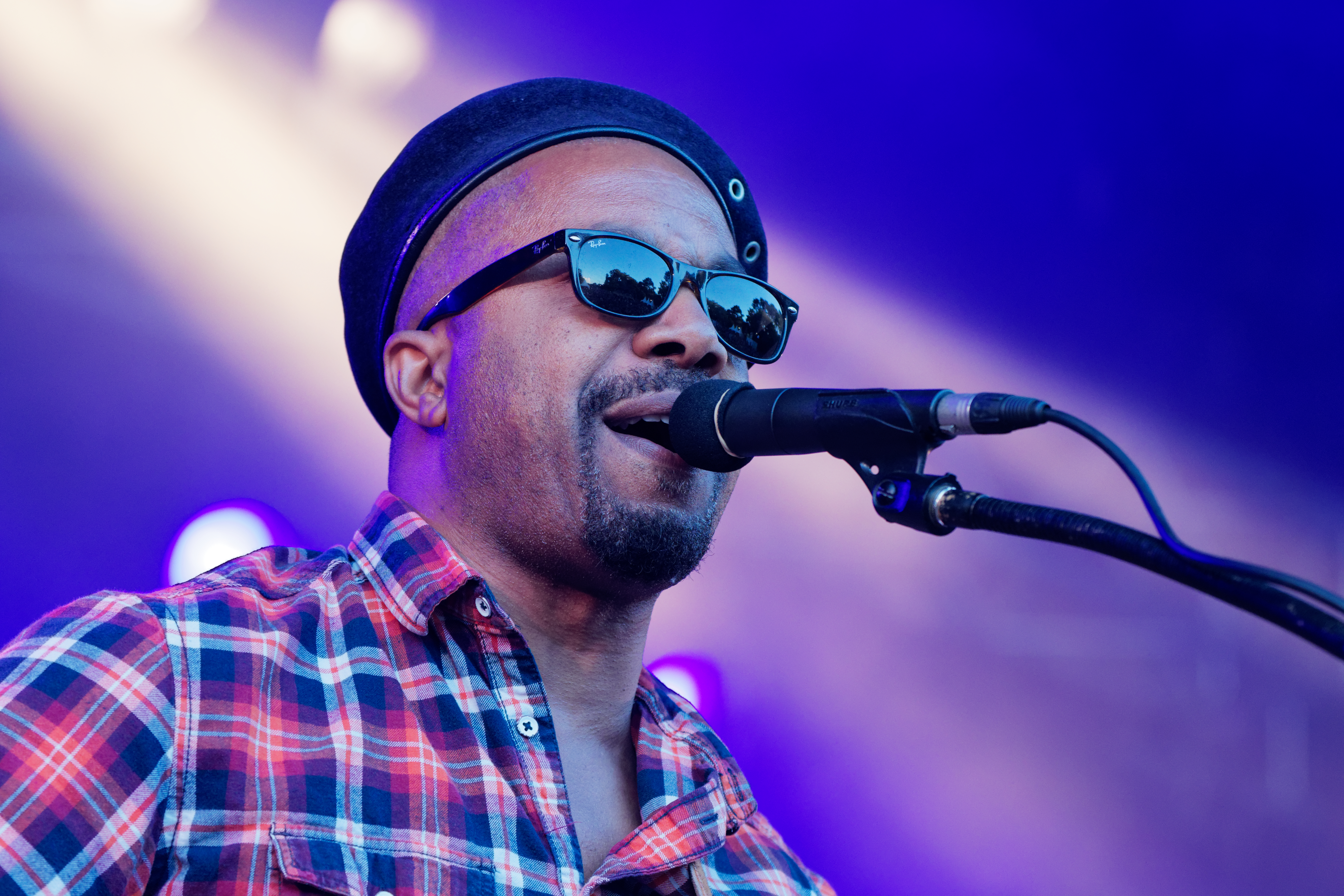 Delgrès en concert sur la scène Kermarrec lors du festival du Bout du Monde 2017 à Crozon dans le Finistère (France).